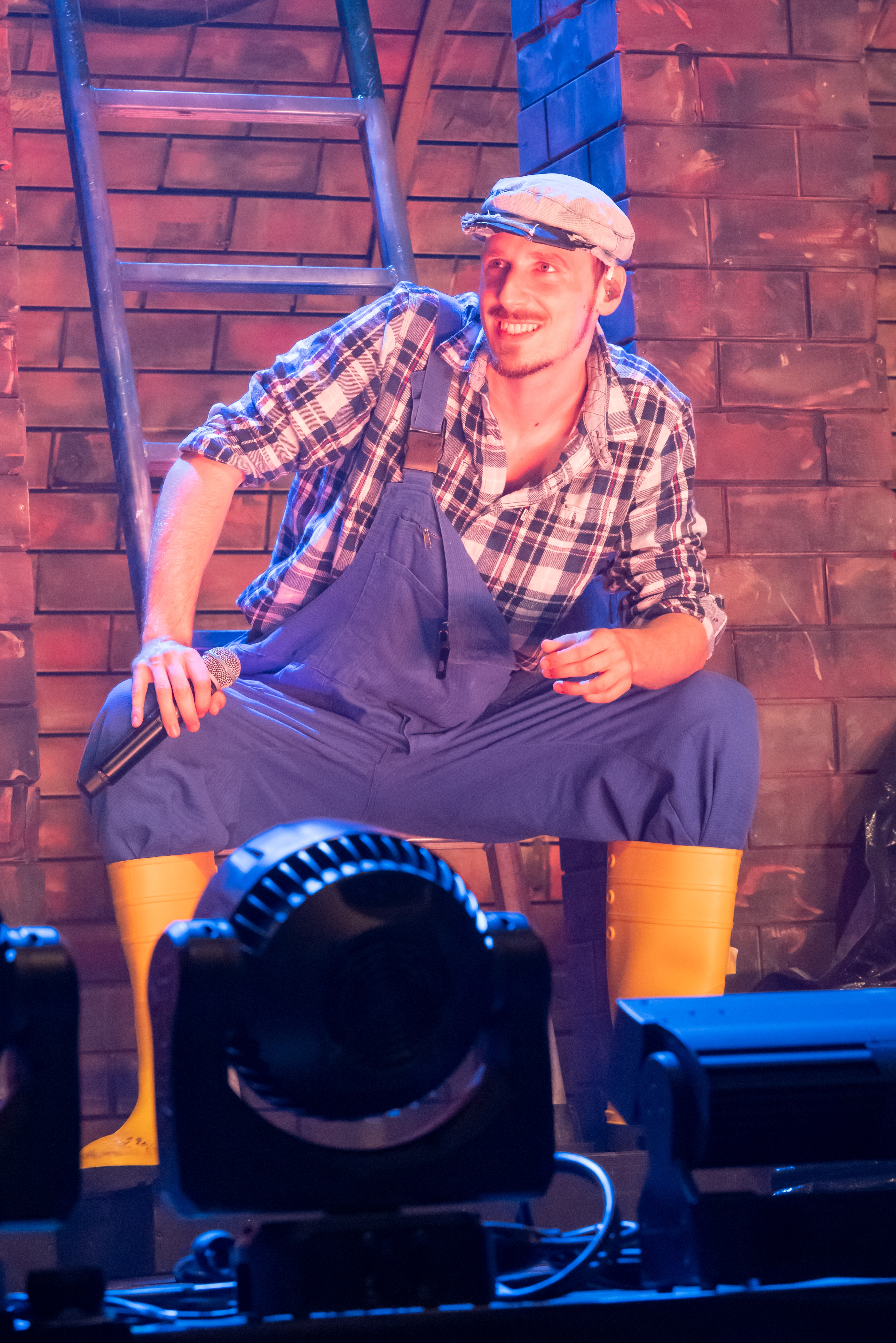 Bilder vom Zelt Musik Festival 2018 in Freiburg im Breisgau Auftritt Alligatoah und Sebel am 20. Juli 2018 im Zirkuszelt